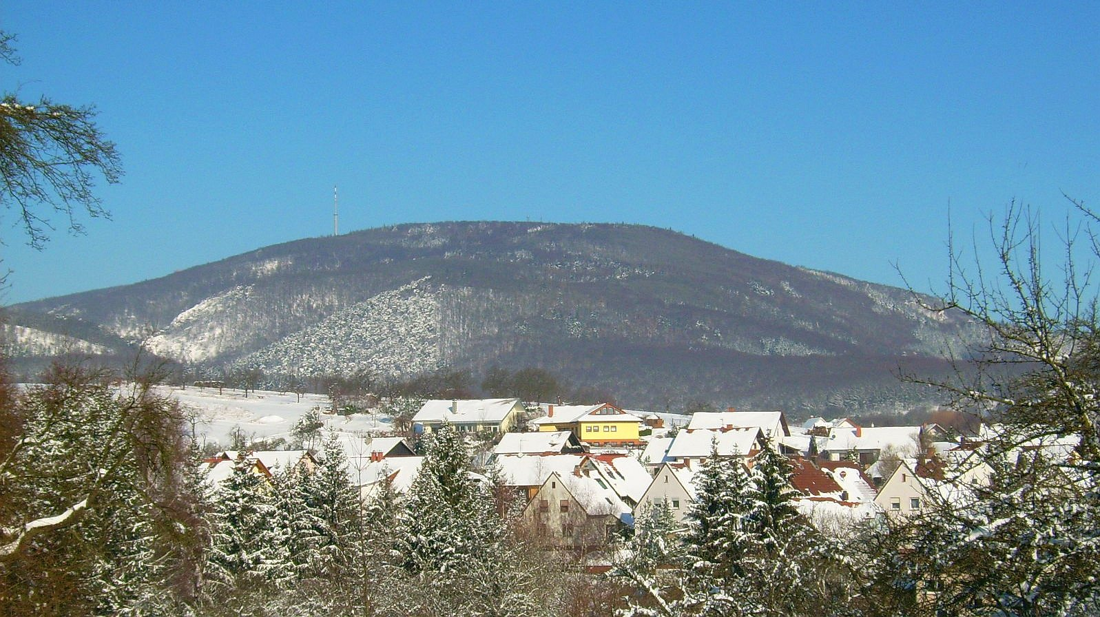 Донерсберг е най-високата планина в Пфалц.